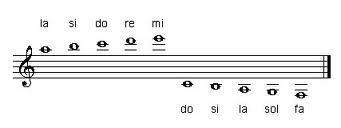 Lerro gehigarriak